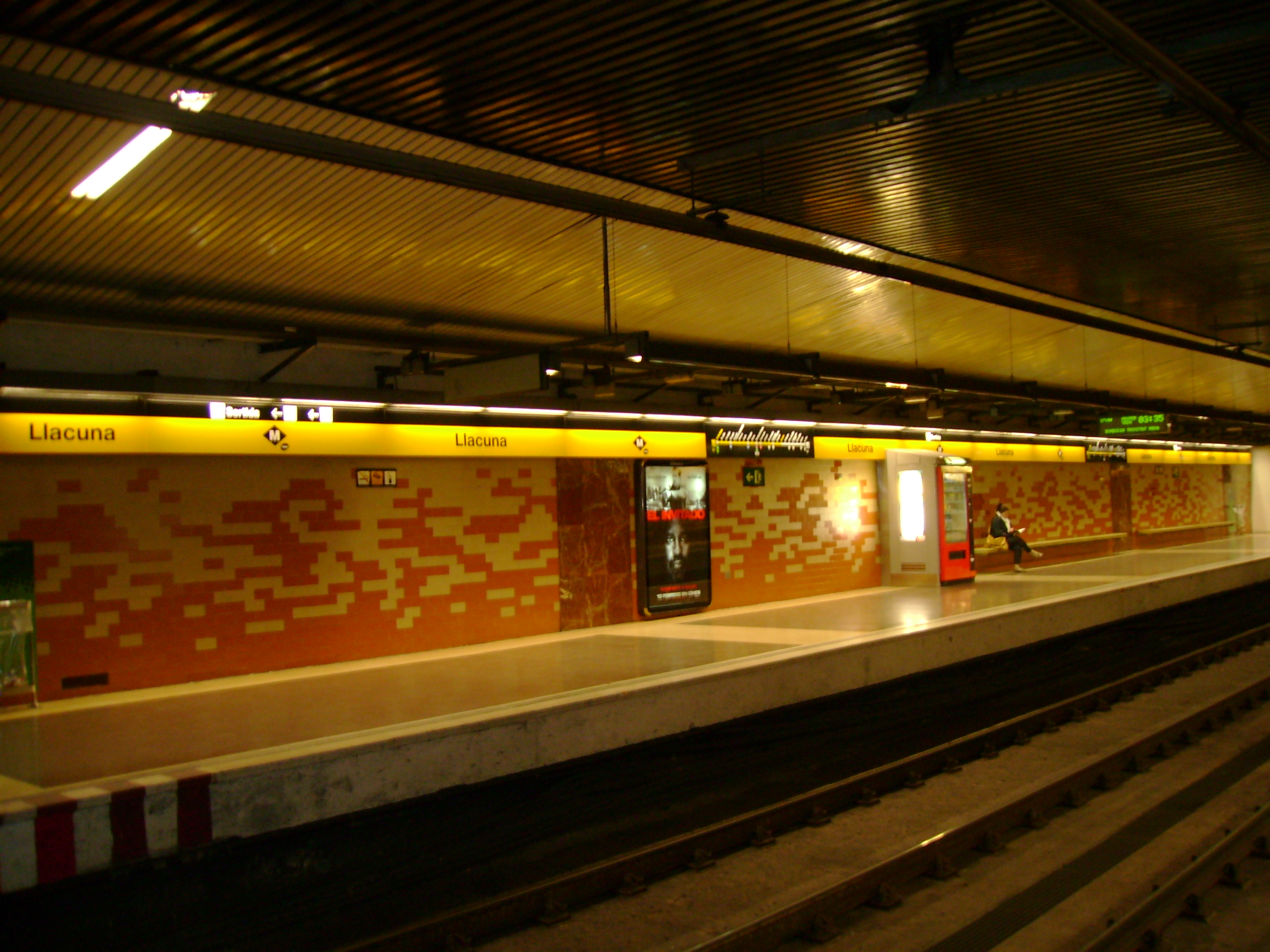 Foto capturada per la meva càmara a l'estació de Llacuna (Metro de Barcelona).